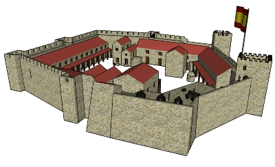 Castillo de Sohail en 3d